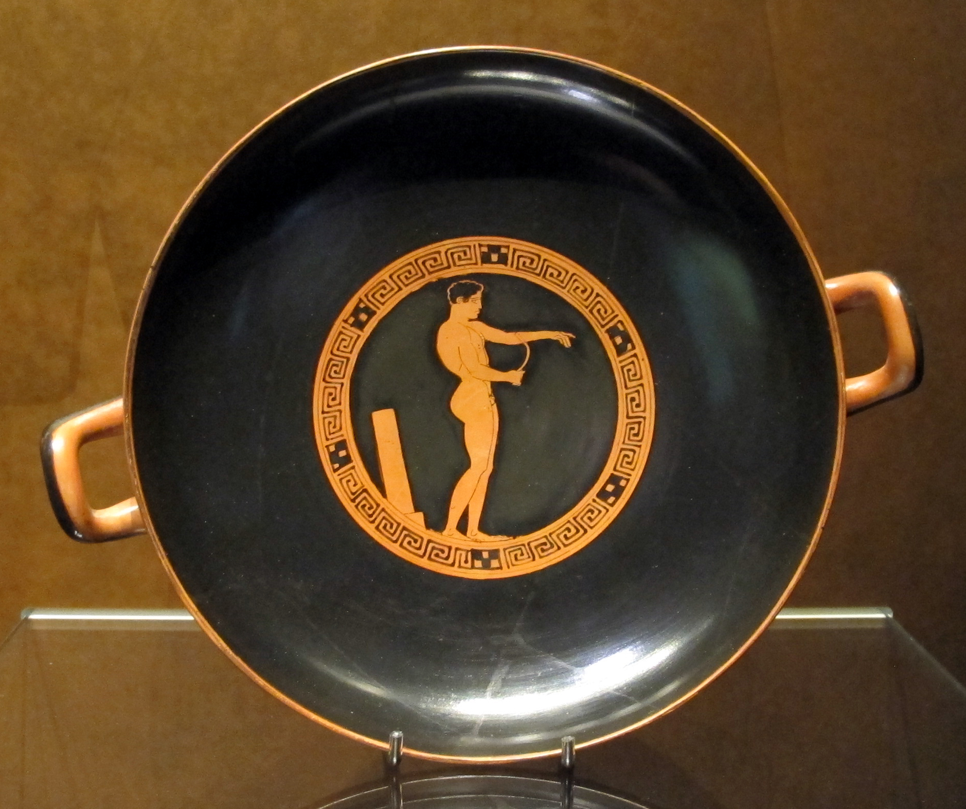 Pittore di codros, kylix attica con atleta che si deterge con uno strigile, 430-20 ac ca..JPG